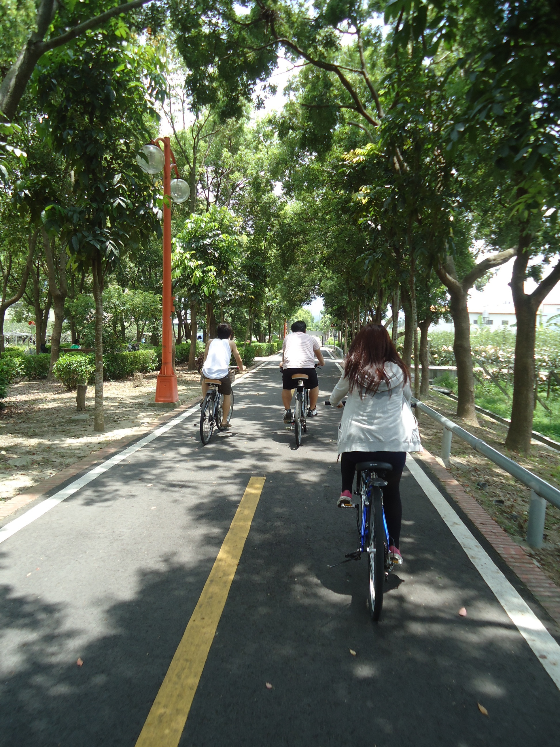 中文（台灣）: 東豐自行車綠廊。